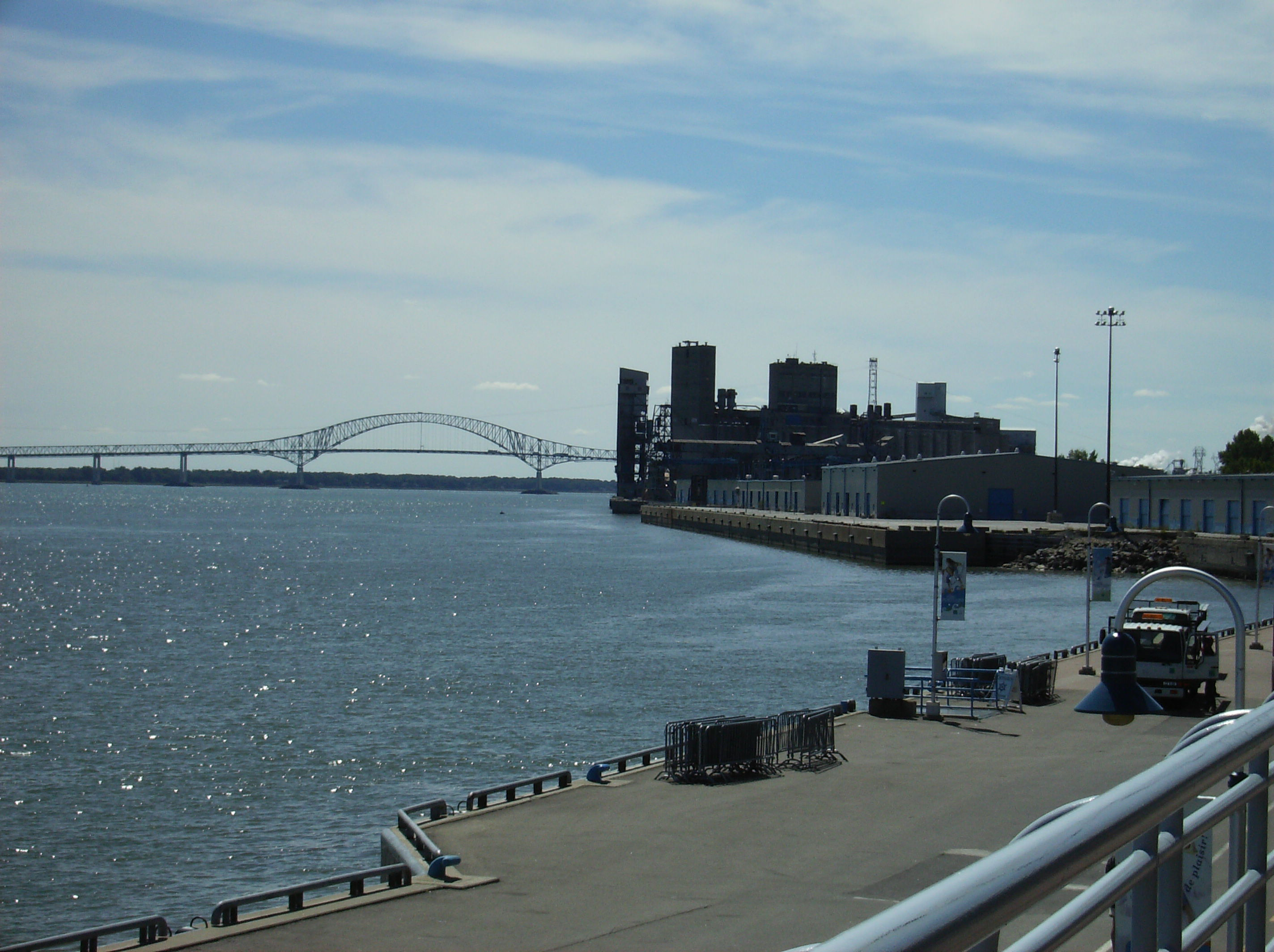 Trois-Rivières pont Laviolette